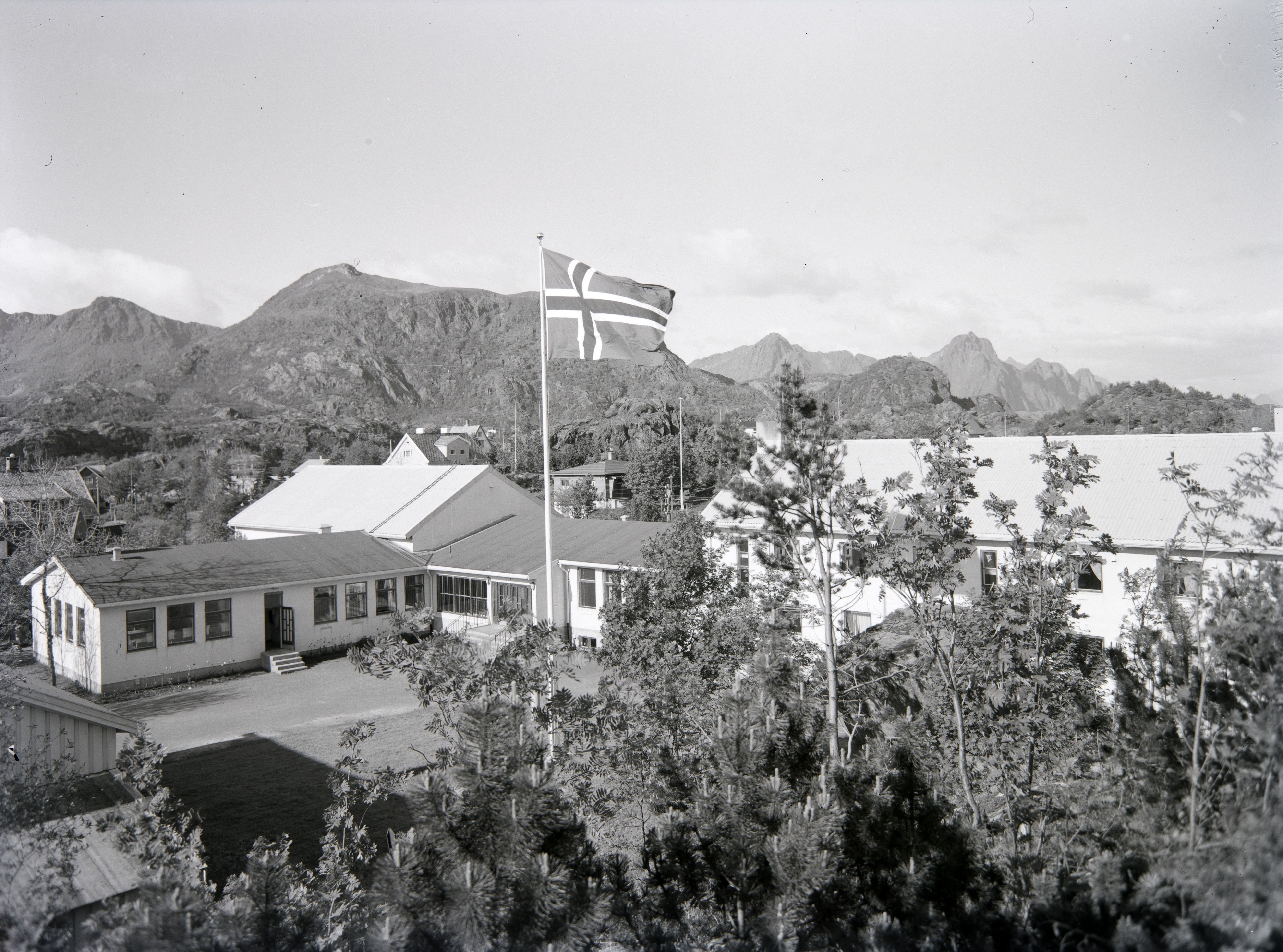 Bildet er hentet fra Nordlandsmuseet bildesamling etter Kanstad. Motivbeskrivelse: Lofoten folkehøyskole. Finnesset, Kabelvåg Sted: Vågan, Kabelvåg, Finneset Nøkkelord: Etnosentrisme Bygninger for religionsutøvelse og undervisning Høyere undervisning